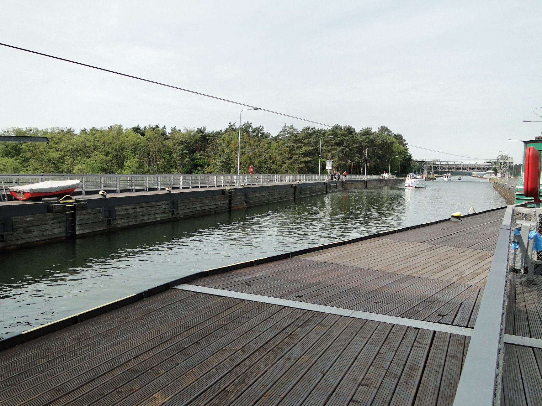 Podnośnia statków w Niederfinow (Niemcy)